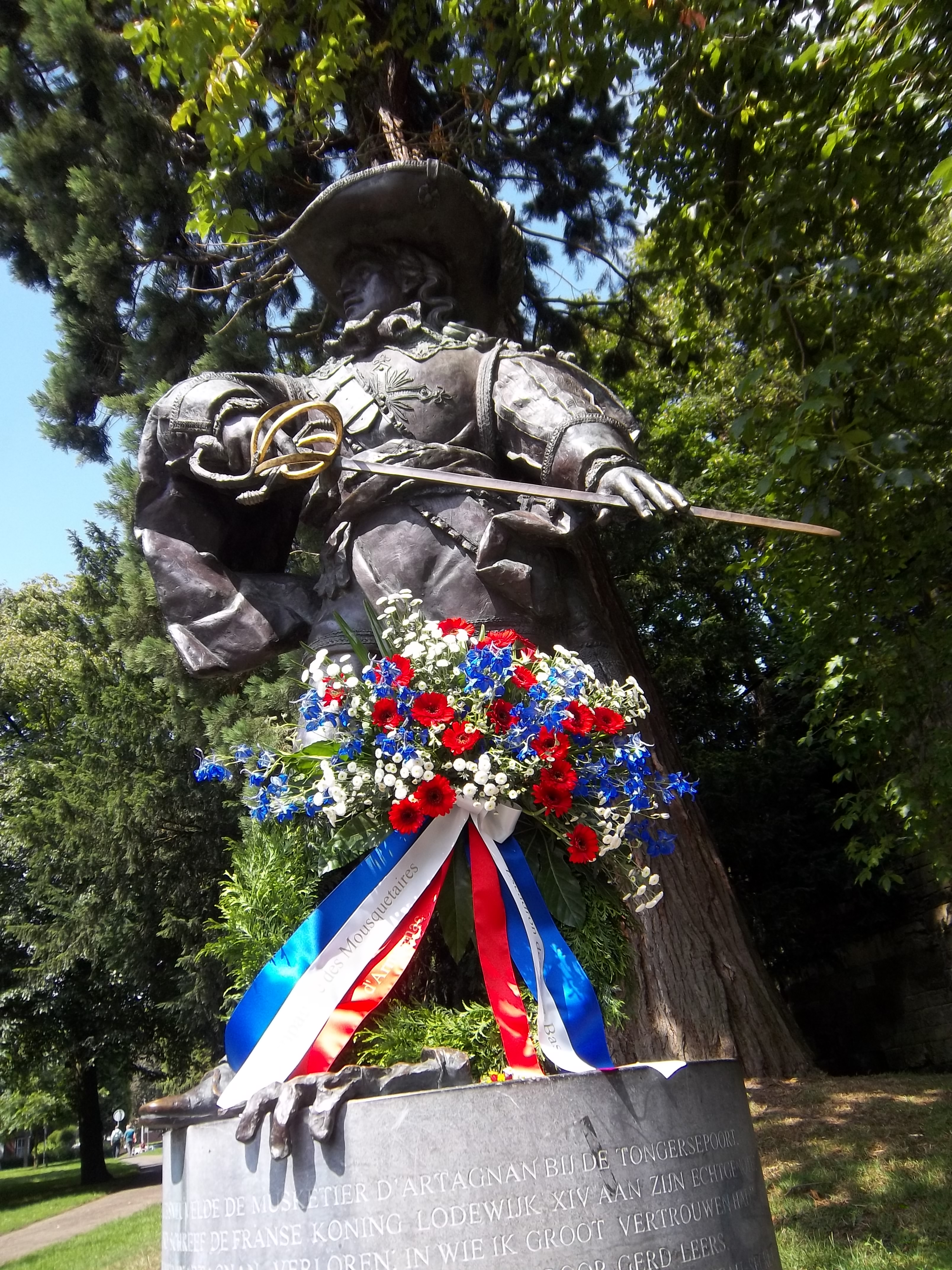 D'Artagnan - Charles de Batz - Comte d'Artagnan